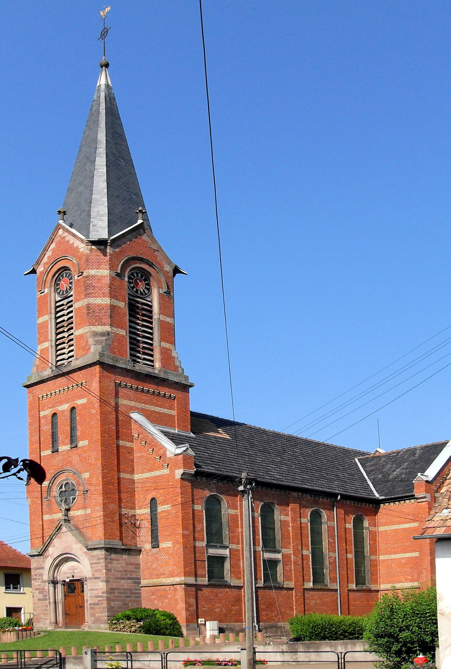 L'église protestante d'Obenheim